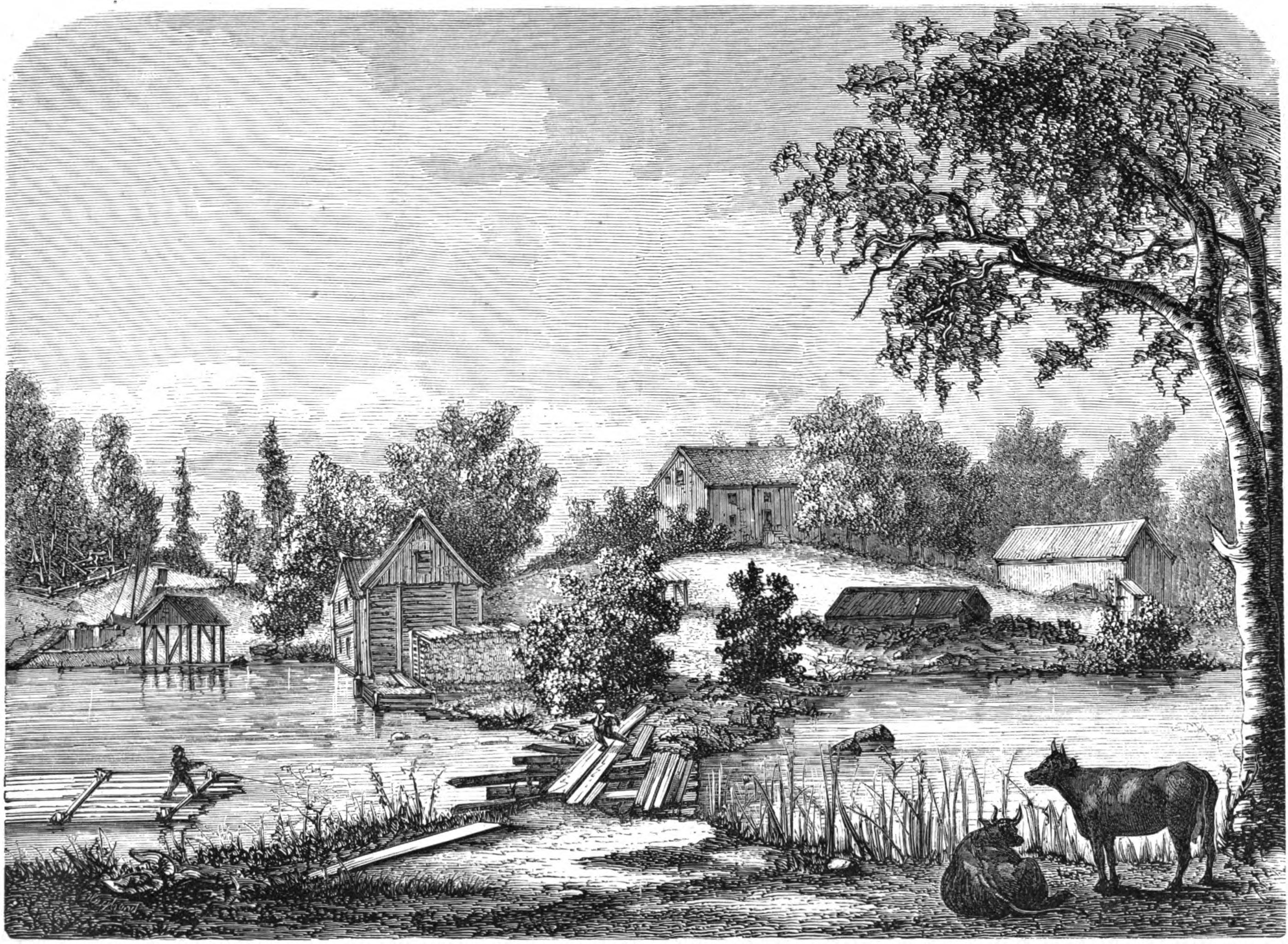 Katrineholms bruk (nuvarande Mustadfors bruk) vid Dalslands kanal.